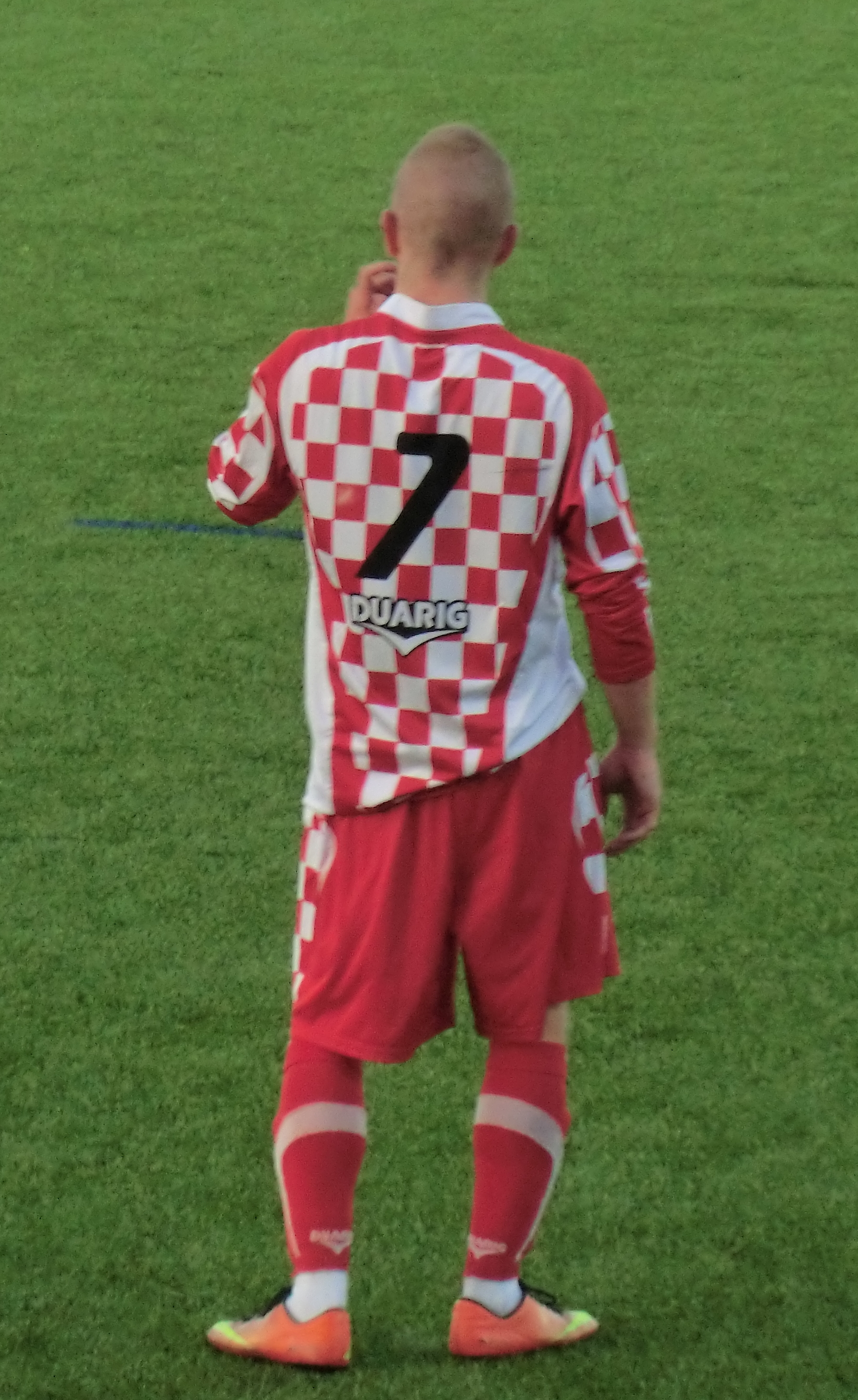 Match amical d'avant-saison entre Ain Sud Foot (honneur) et le FC Lyon (PHR) le 14 août 2013. Score final 7 à 1. Buteurs pour Ain Sud Foot : Joubert (x3), Thomas (x2), Chanel, Courtial. Ain Sud Foot joue en noir en blanc ; FC Lyon en rouge et blanc.